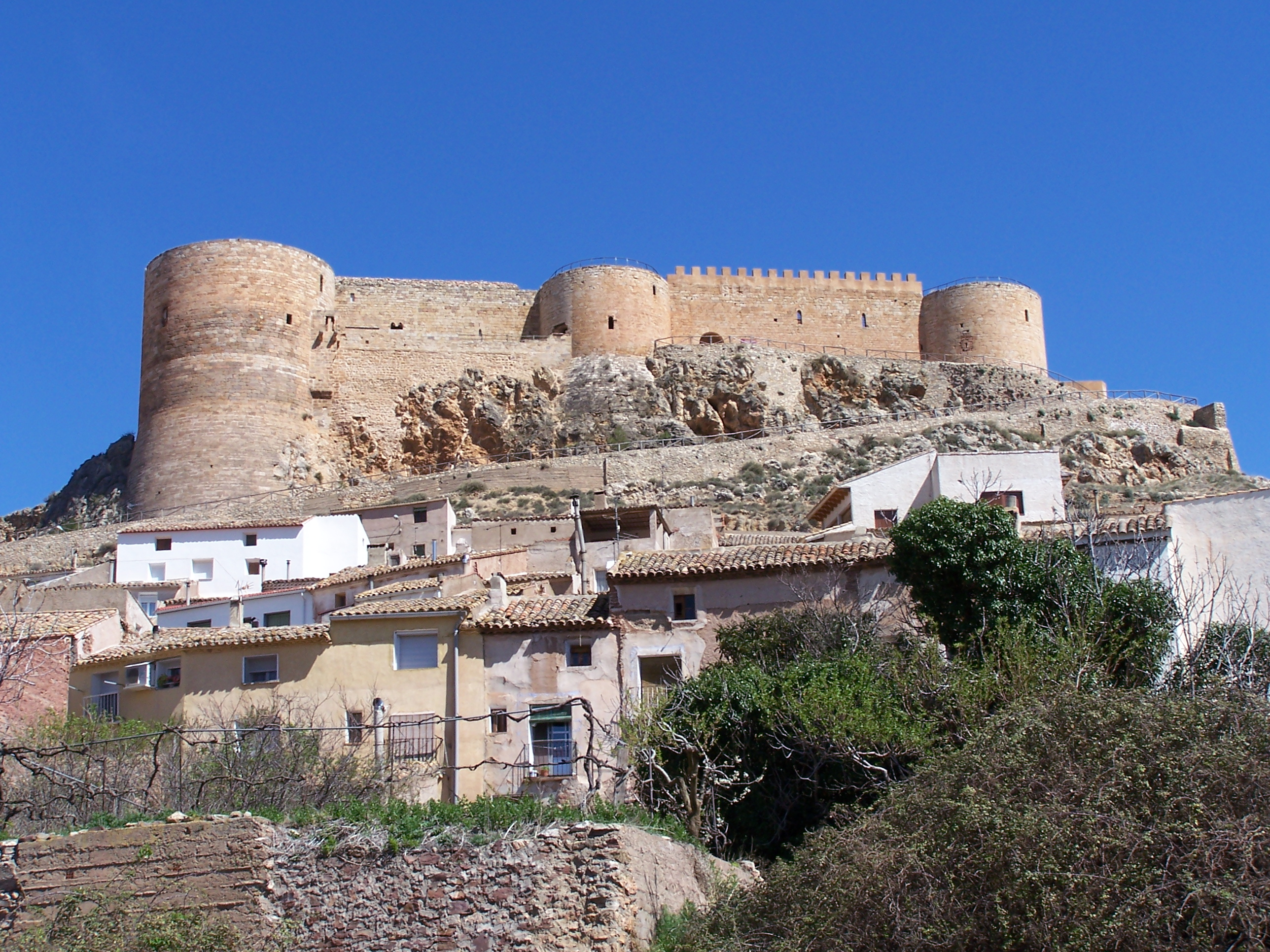 Castillo de Mesones, vista general de la cara oeste